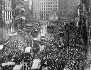 Boston Police Strike, 1919